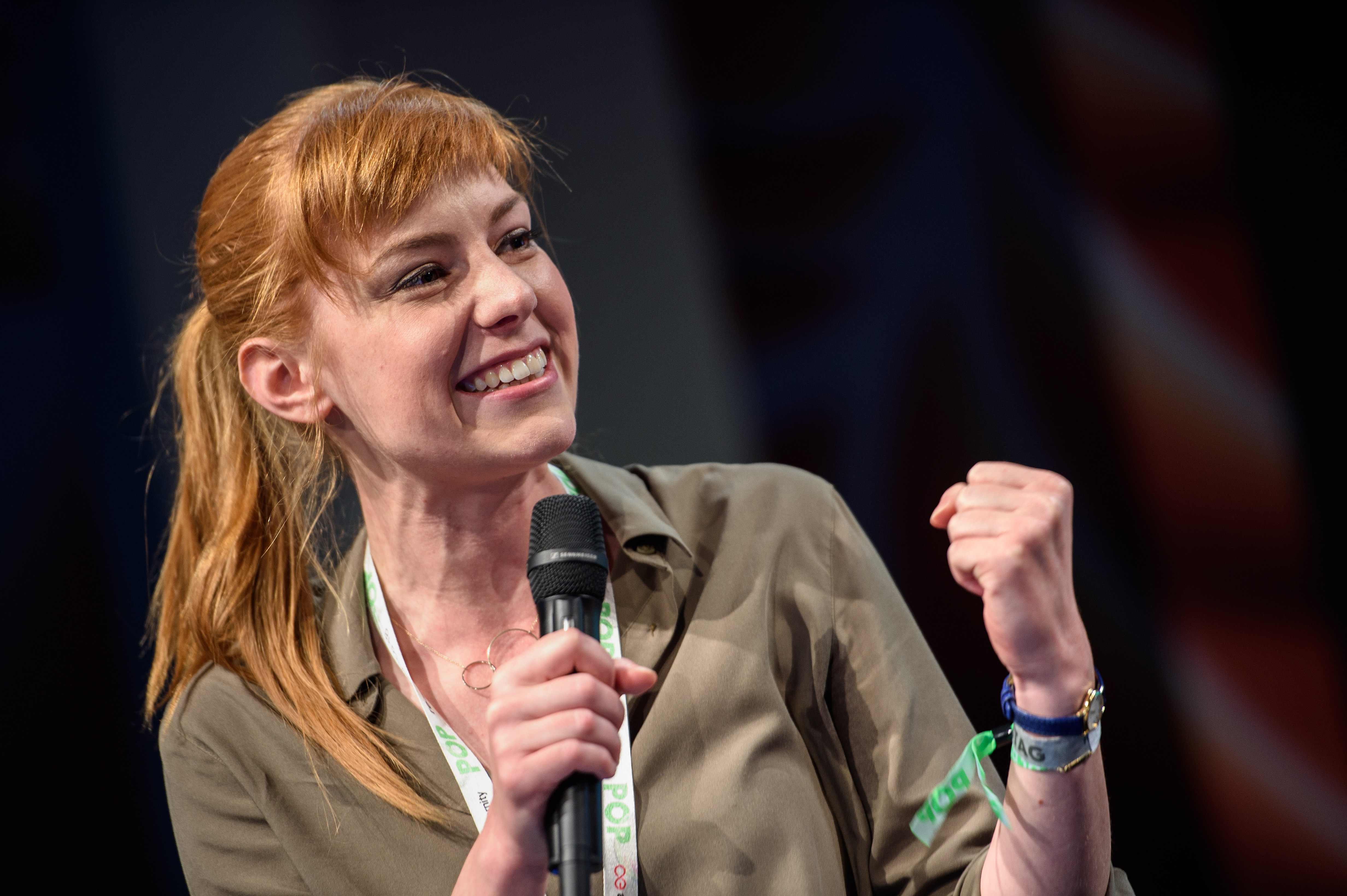 03.05.2018, Berlin: Discussion: #NextNewsLab - wie sieht der Nachrichten-Journalismus von morgen aus? Speaker: Eva Schulz, Patrick Weinhold, Jochen Wegner, Lina Timm, Teja Adams Die re:publica ist eine der weltweit wichtigsten Konferenzen zu den Themen der digitalen Gesellschaft und findet in diesem Jahr vom 02. bis 04. Mai in der STATION-Berlin statt. Foto: Gregor Fischer/re:publica